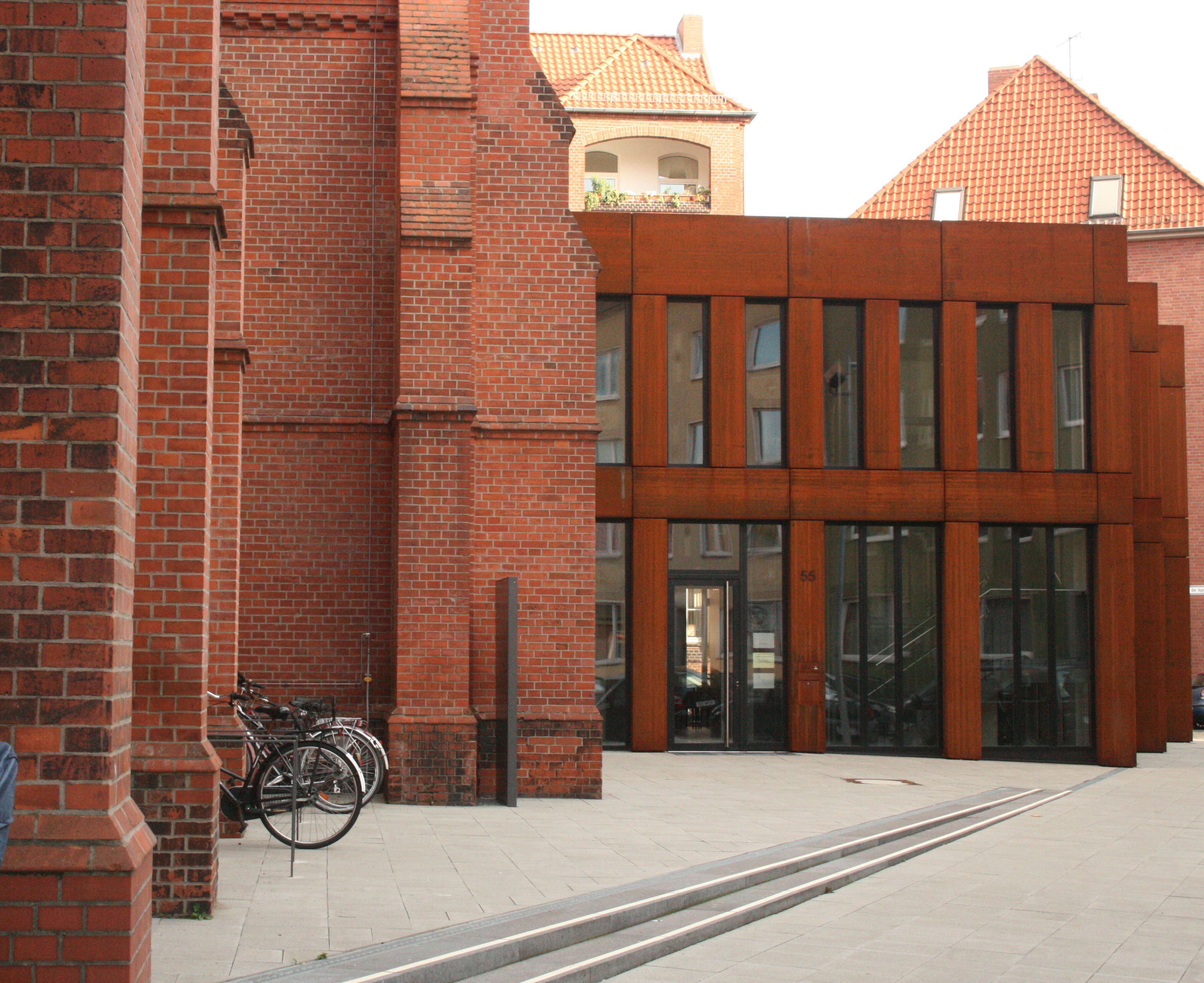 Von Conrad Wilhelm Hase 1880 bis 1884 gebaute Kirche in Hannovers Oststadt, ein neugotischer Ziegelbau im Stil einer Basilika mit einem hohen Mittelschiff und Emporen. Diese Kirche wird als Hases reinster neugotischer Bau angesehen (Informationsblatt in der Kirche). Die Kirche blieb nicht von Zerstörungen durch die Bombardierung im 2. Weltkrieg verschont, durch drei Brandbomben wurden das Dach und die Kapelle beschädigt. Vor weiteren Brandschäden konnten die Feuer gelöscht werden. Die Ausstattung der Kirche, Altar, Kanzel mit Schalldeckel und Lesepult, ist Hases Entwurf. Chorgestühl und Bankreihen stammen noch aus der Bauzeit. Das 2012/2013 entstandene neue Gemeindehaus wurde an die Kirche angebaut und hat Zugänge in die Kirche im Erdgeschoß und auf der Empore.